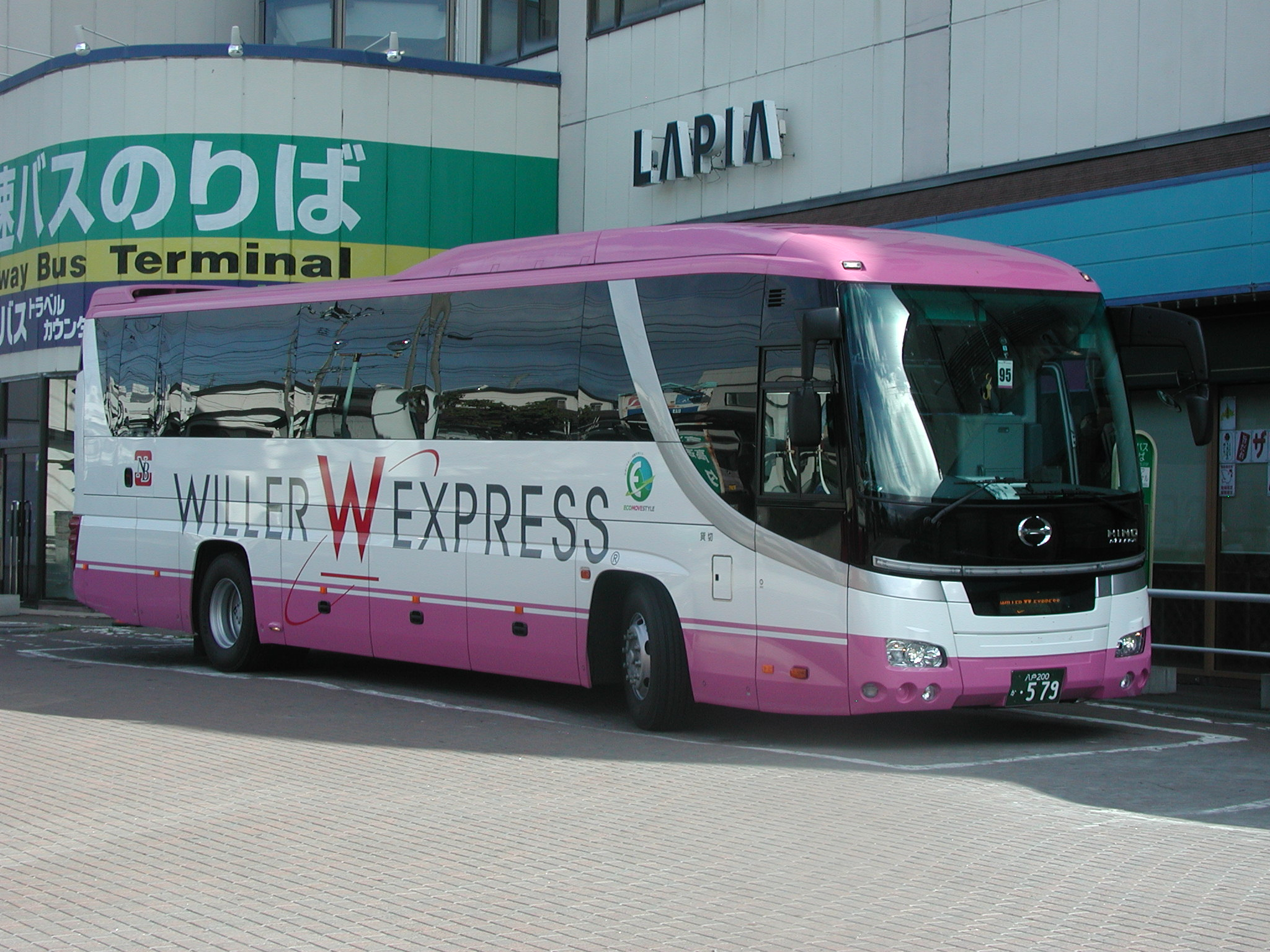 八戸ラピアバスターミナルに到着した、「WILLER-EXPRESS」（日野・セレガ（PKG-RU1ESAA）、南部バス管理）